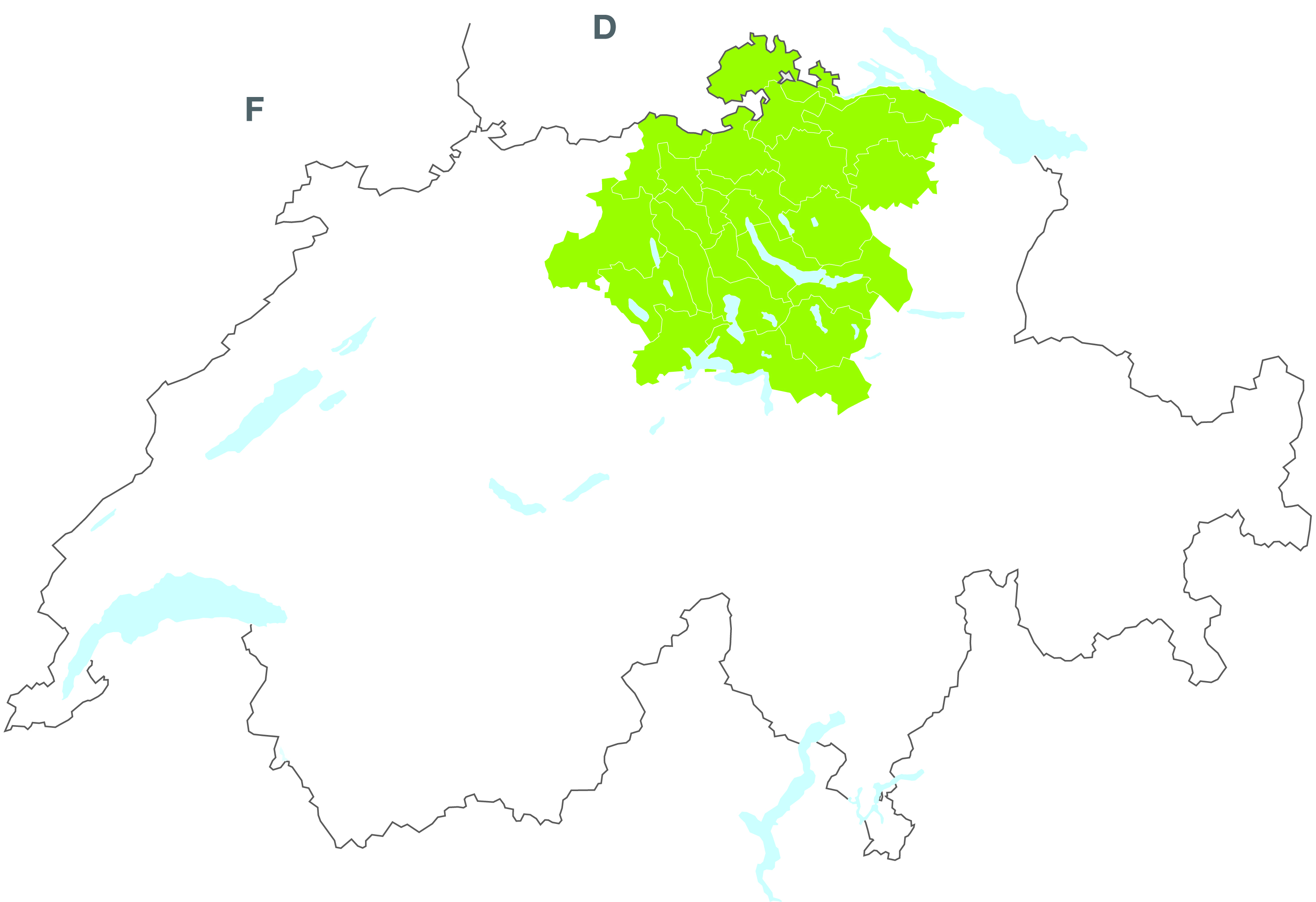 Mitglieder der Metropolitankonferenz Zürich Stand März 2012